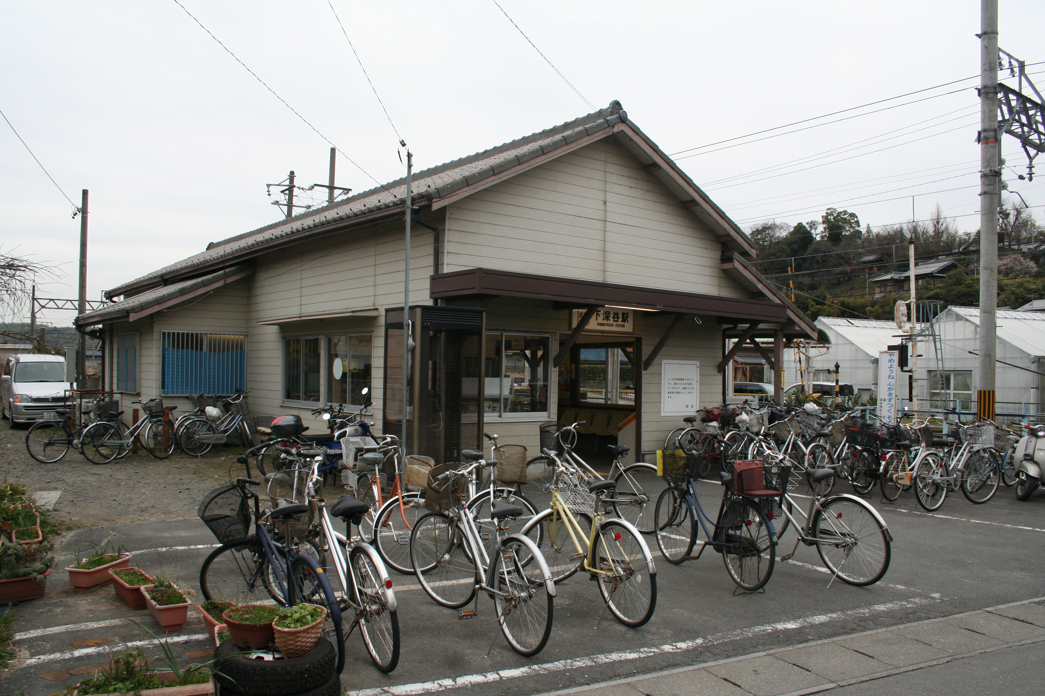 下深谷駅